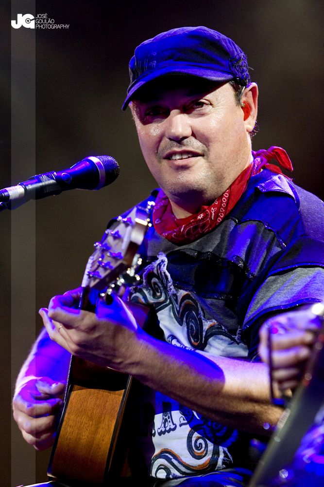 Tim, vocalista dos Xutos e Pontapés